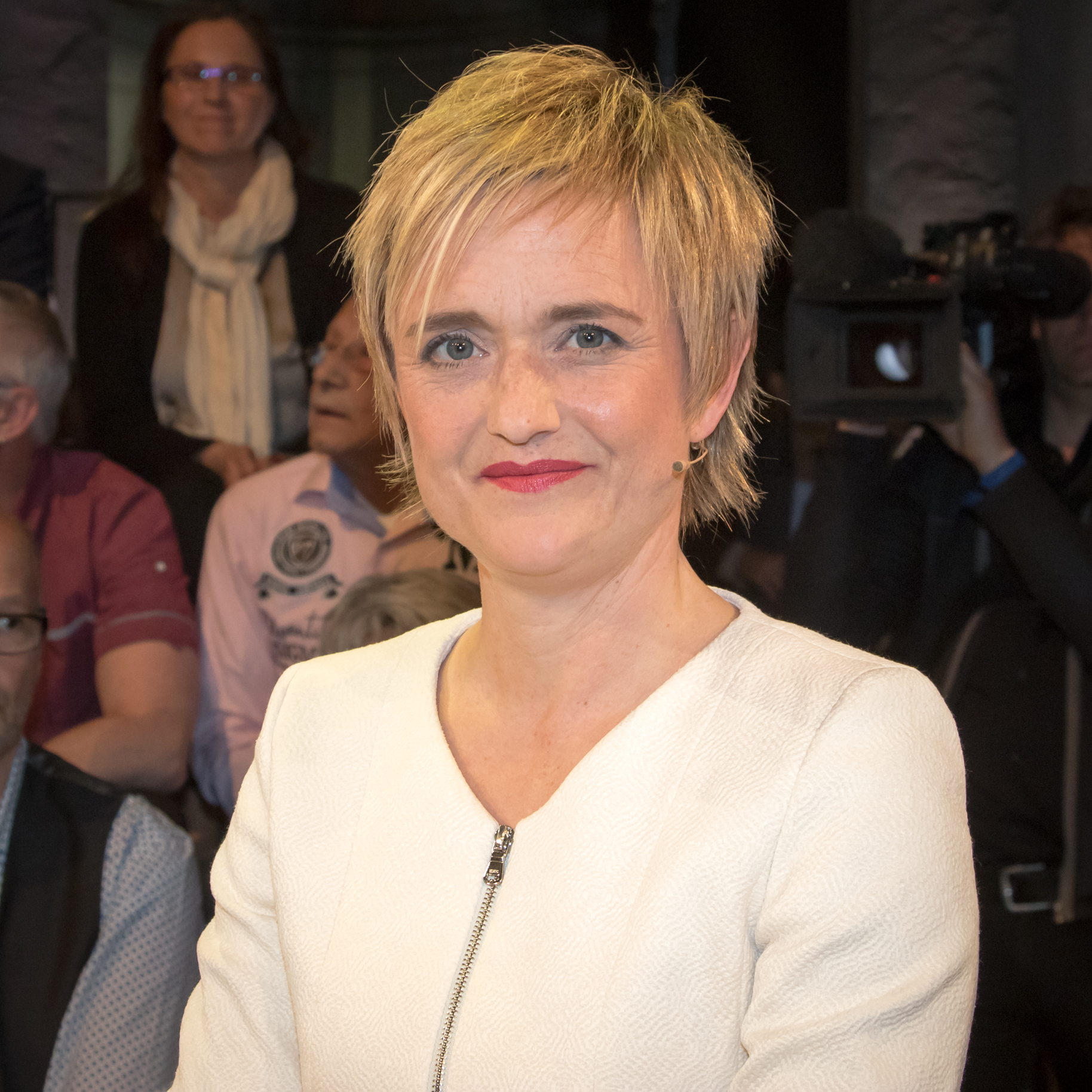 WDR-Sendung Wahl-Arena, Donnerstag, 4. Mai 2017 zur NRW-Wahl: Ellen Ehni (Moderation)